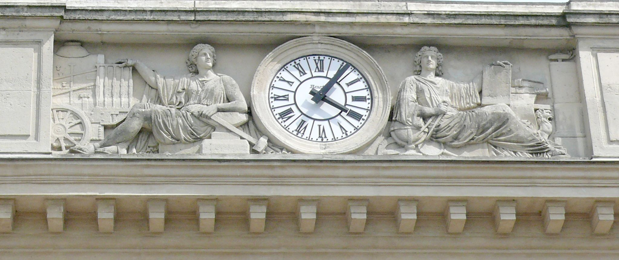 Fronton allégorique de la Gare RER de Denfert Rochereau